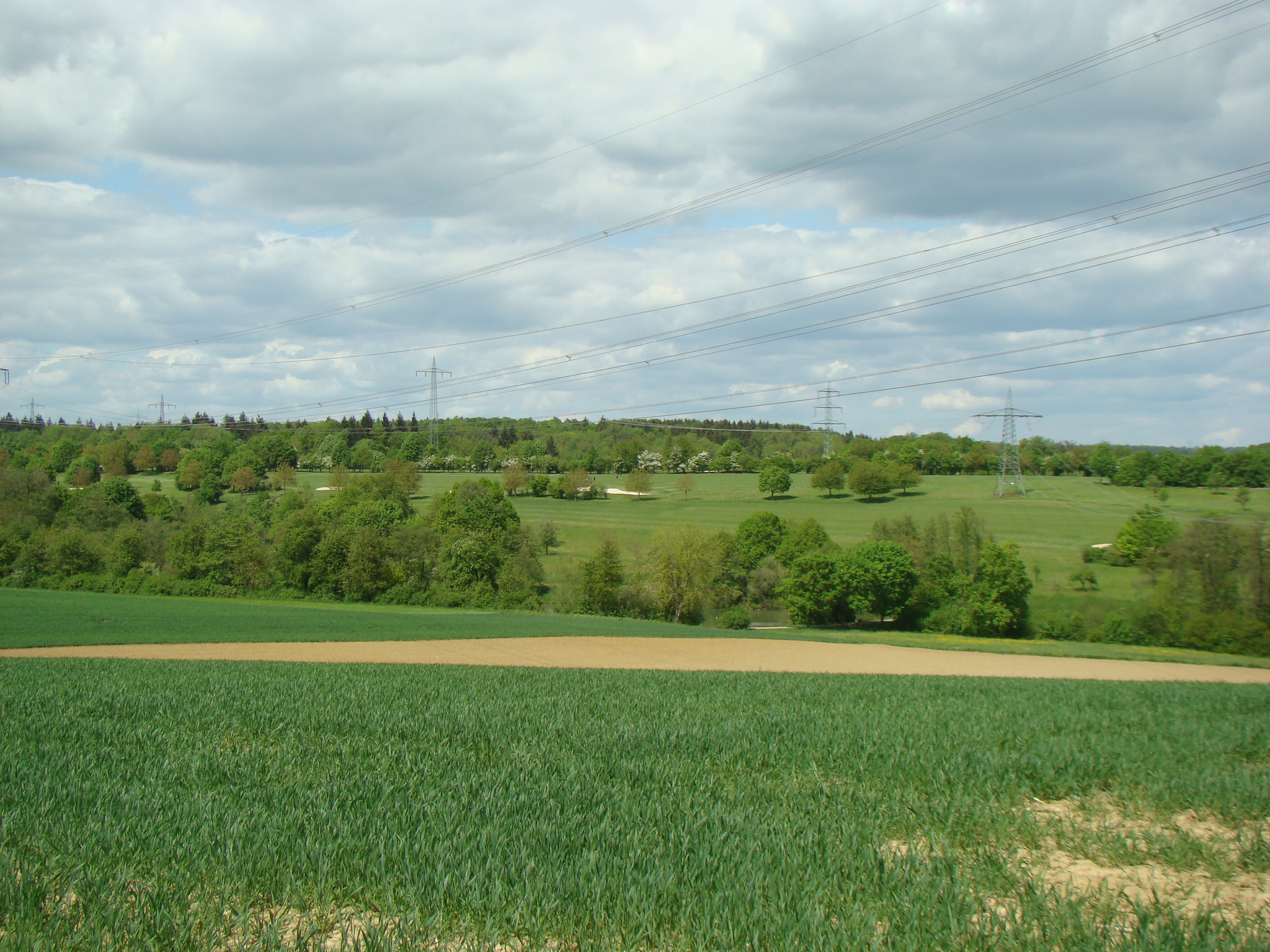 Römersee bei Bad Rapppenau-Zimmerhof, Blick ins Tefenbachtal mit dem Römersee